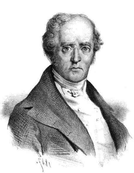 Fourier.